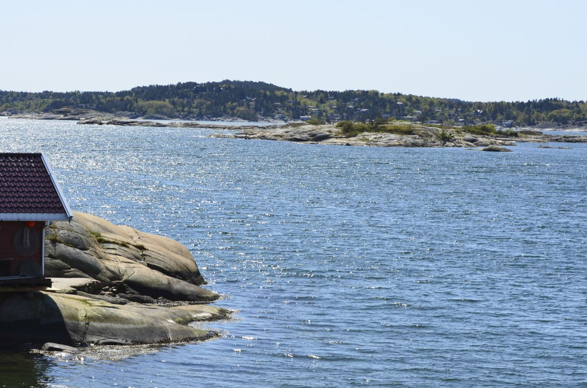 Marøyskjæra ligger nær Natholmen, ytterst i Lahellefjorden.